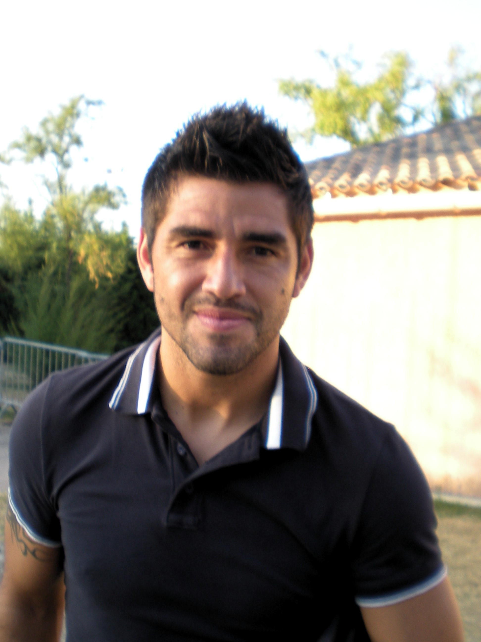 Marco Estrada après l'entrainement en Juillet 2012.